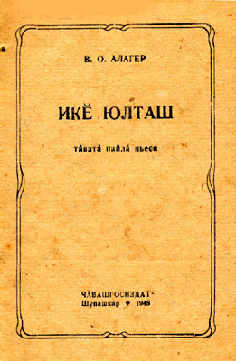 Чӑвашла: Икӗ юлташ. Алакӗр Ваҫлейӗ. 1948 ҫул. Кӗнеке хуплашки